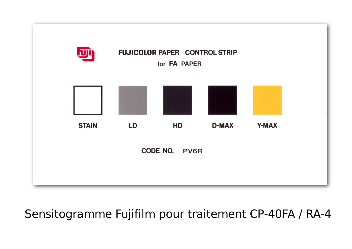 Sensitogramme Fujifilm pour traitement CP-40FA / RA-4